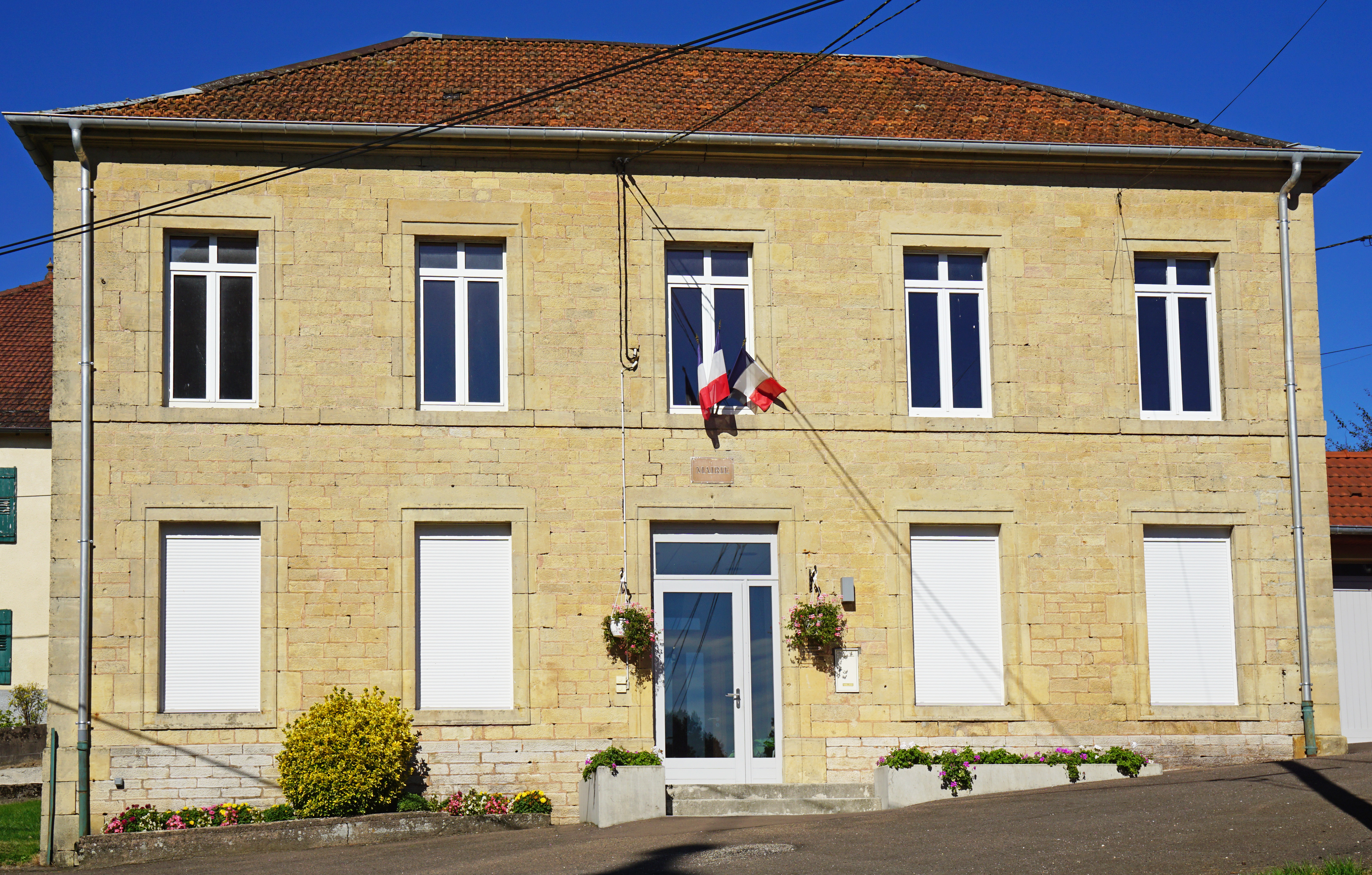 La mairie de Genevreuille.